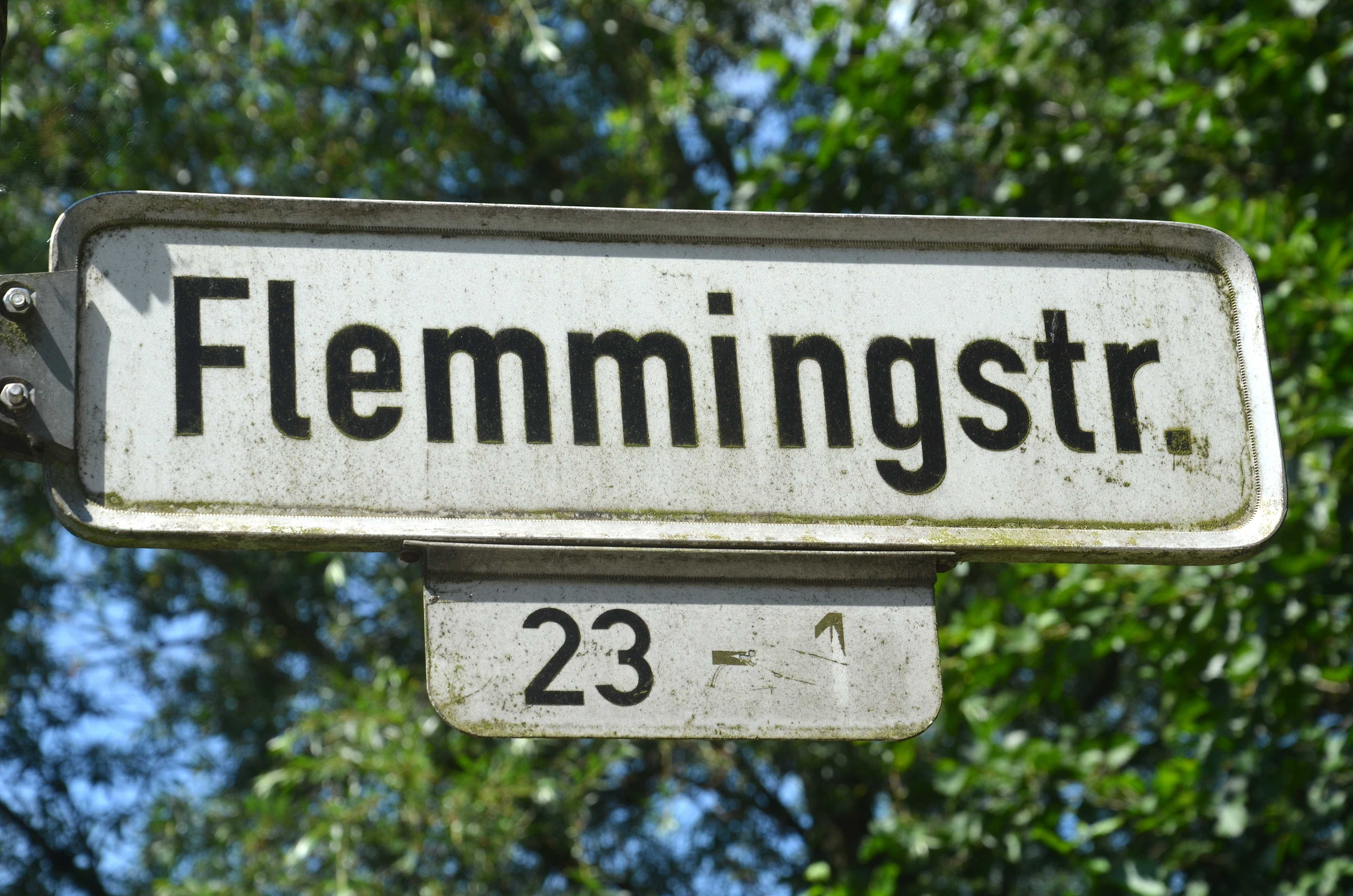 Während einer Fahrrad-Exkursion von Mitarbeitern des Wikipedia-Büros Hannover nach Resse in der Wedemark entstand dieses Foto vom Straßenschild der Flemmingstraße Ecke Robert-Hesse-Straße nahe der ehemaligen Flemmingschen Tonkuhle in Berenbostel, einem Stadtteil von Garbsen ...